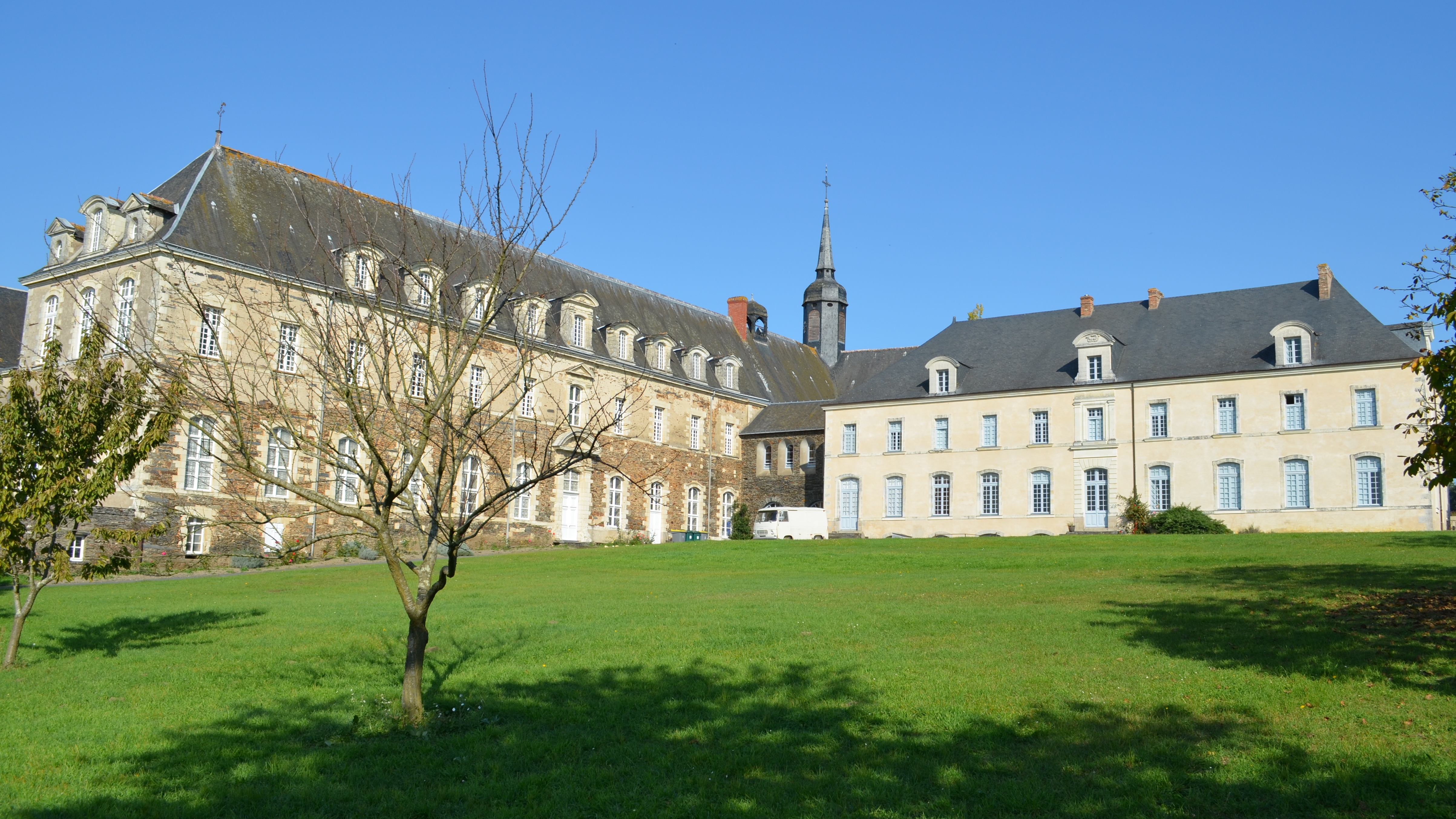 Abbaye Notre-Dame de Melleray - La Meilleraye-de-Bretagne (Loire-Atlantique) This building is en partie classé, en partie inscrit au titre des Monuments Historiques. .